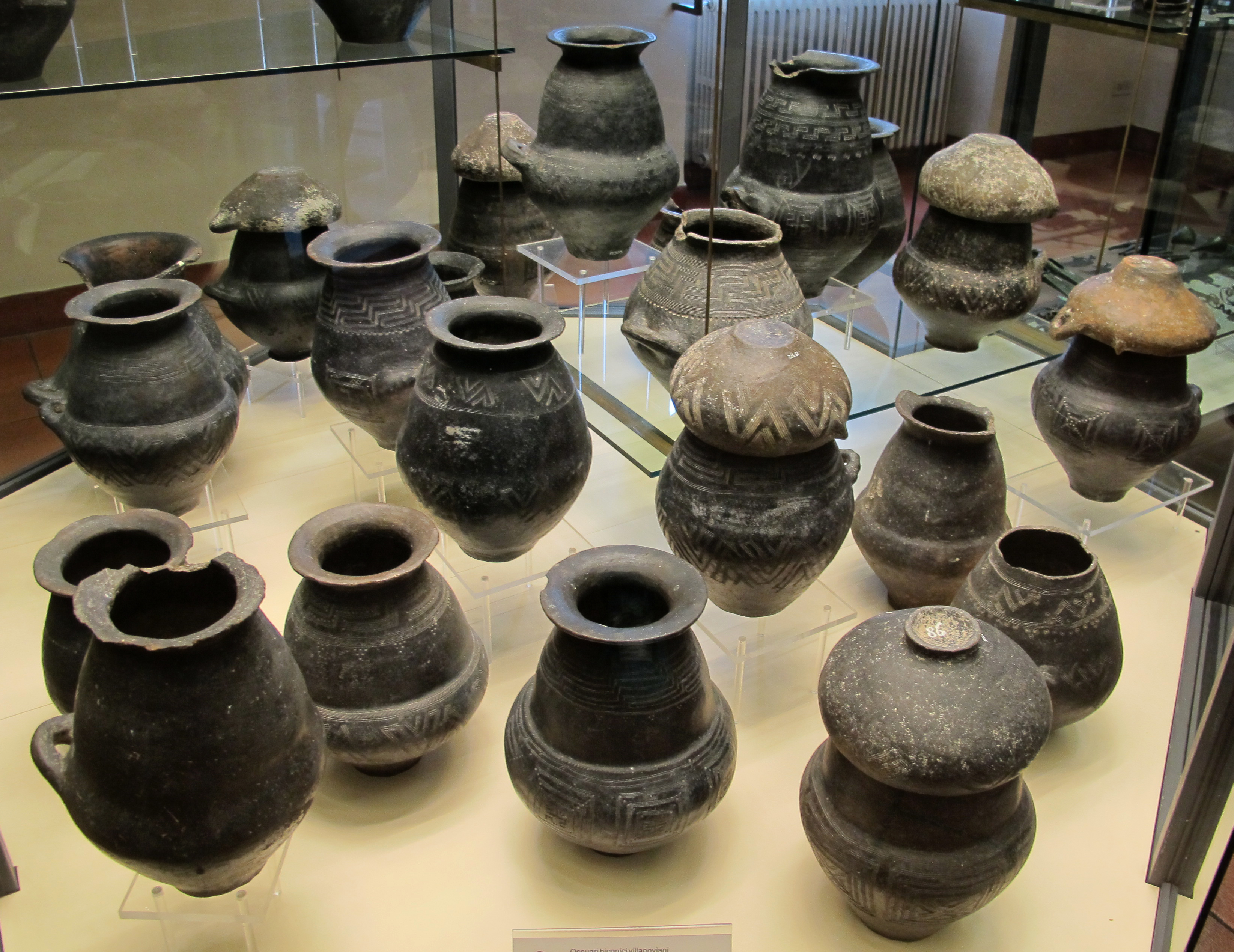 Museo Gregoriano Etrusco